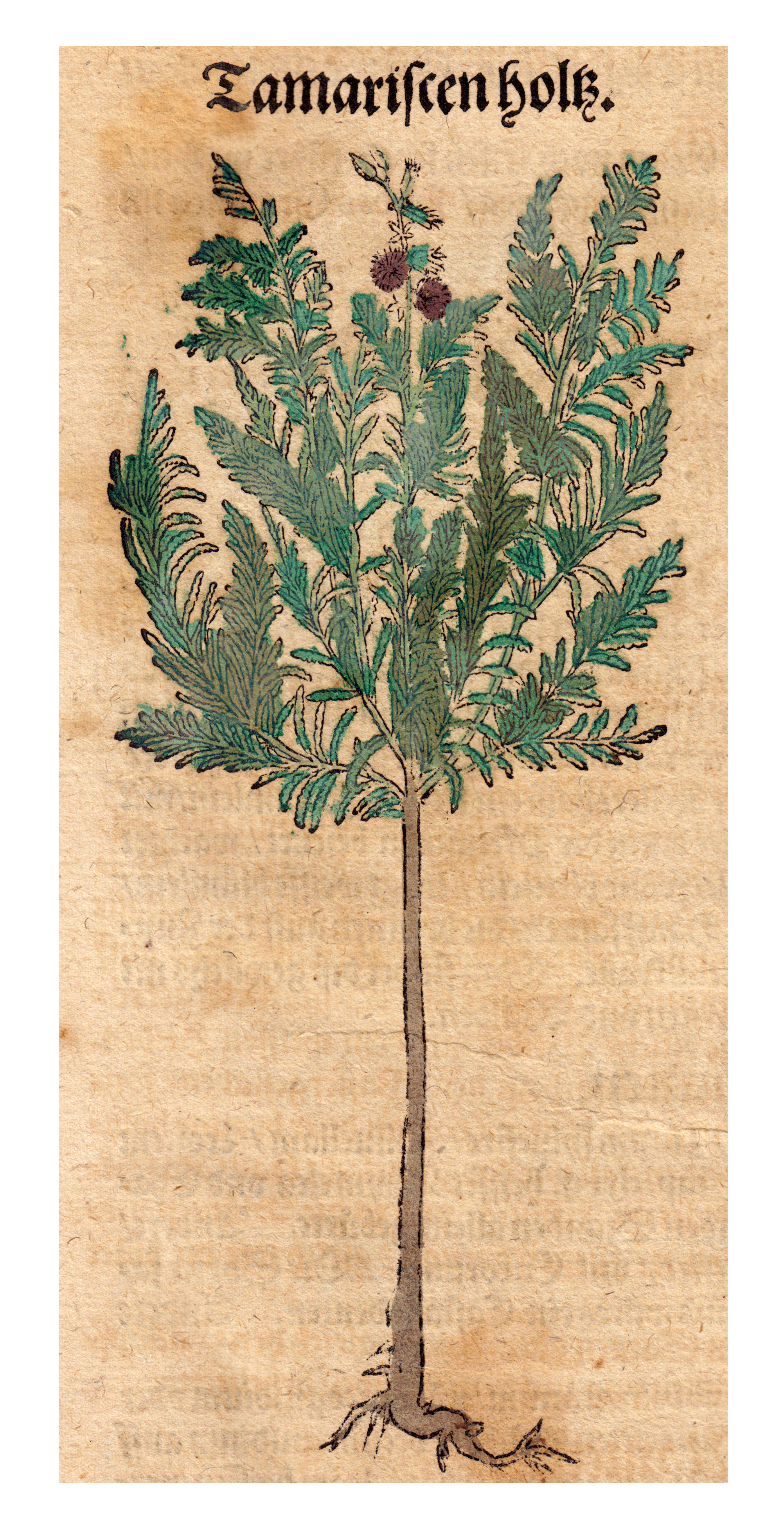 Myricaria germanica. Abbildung